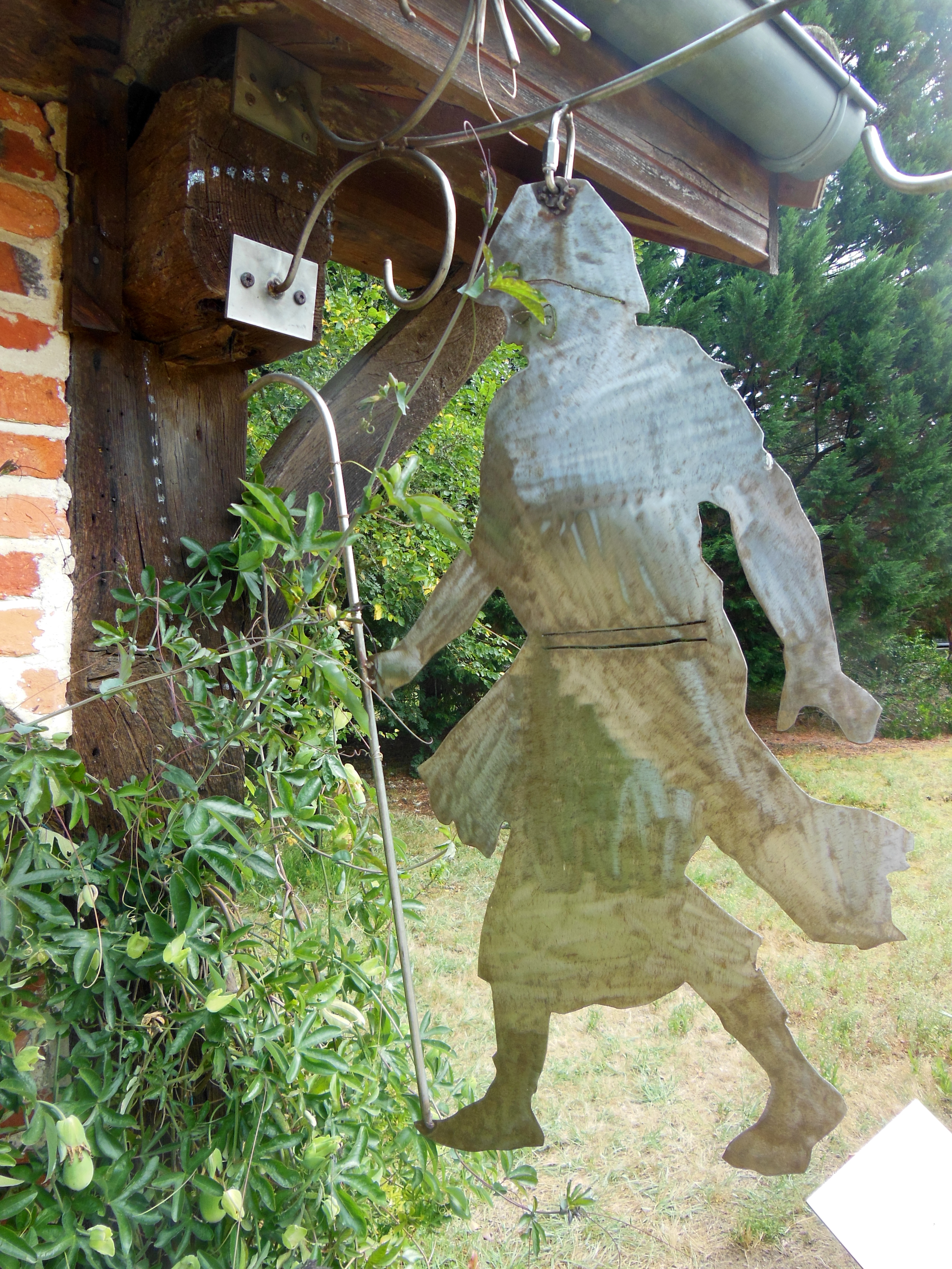 Enseigne de pèlerinage du site de Bouricos (Pontenx-les-Forges, Landes, France)